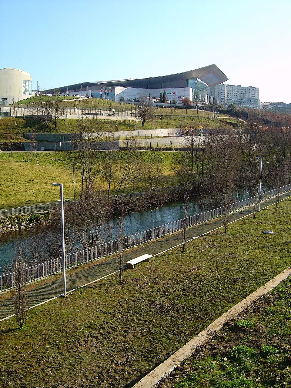 Parque de Codessais